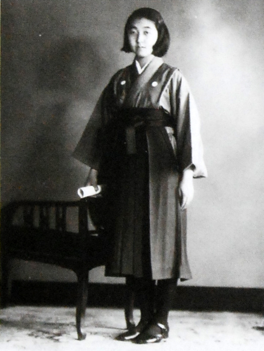 昭和天皇の皇女・成子内親王が、女子学習院を修了する記念写真